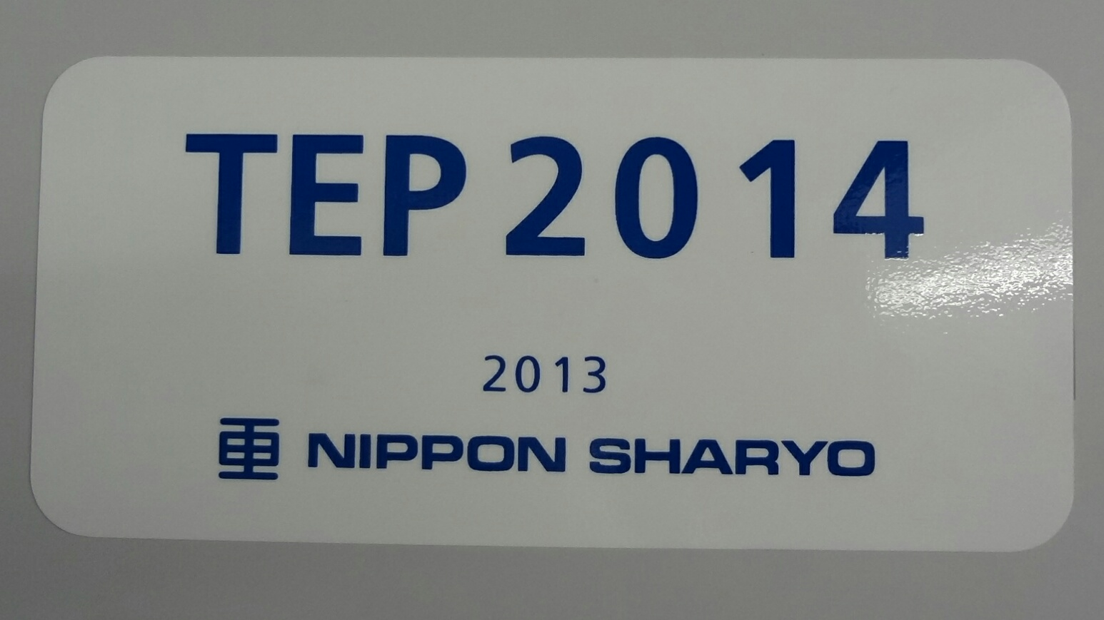 臺灣鐵路管理局TEMU2000型電聯車車廂TEP2014內的日本車輛車號標籤